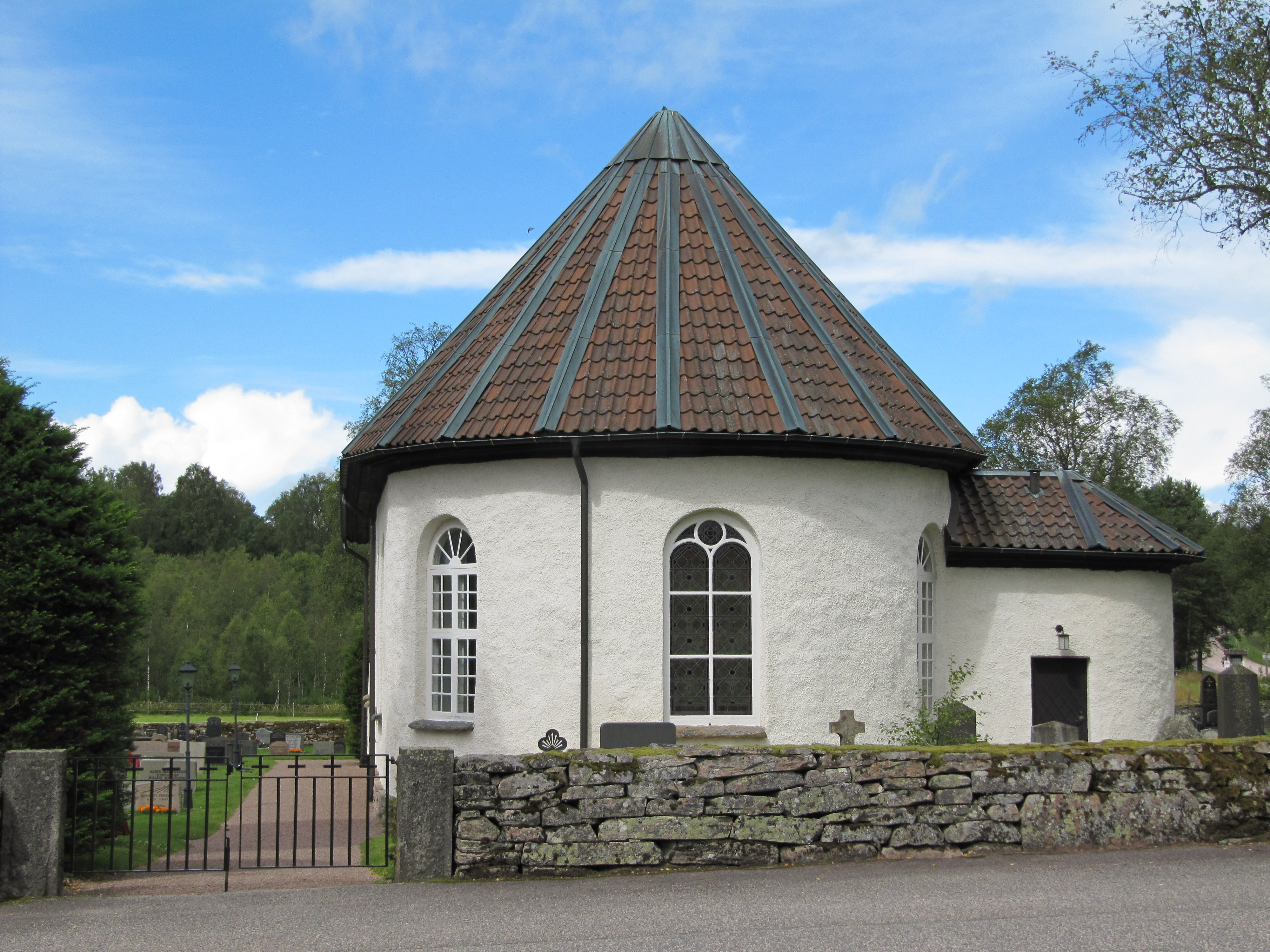 Ljungsarps kyrka